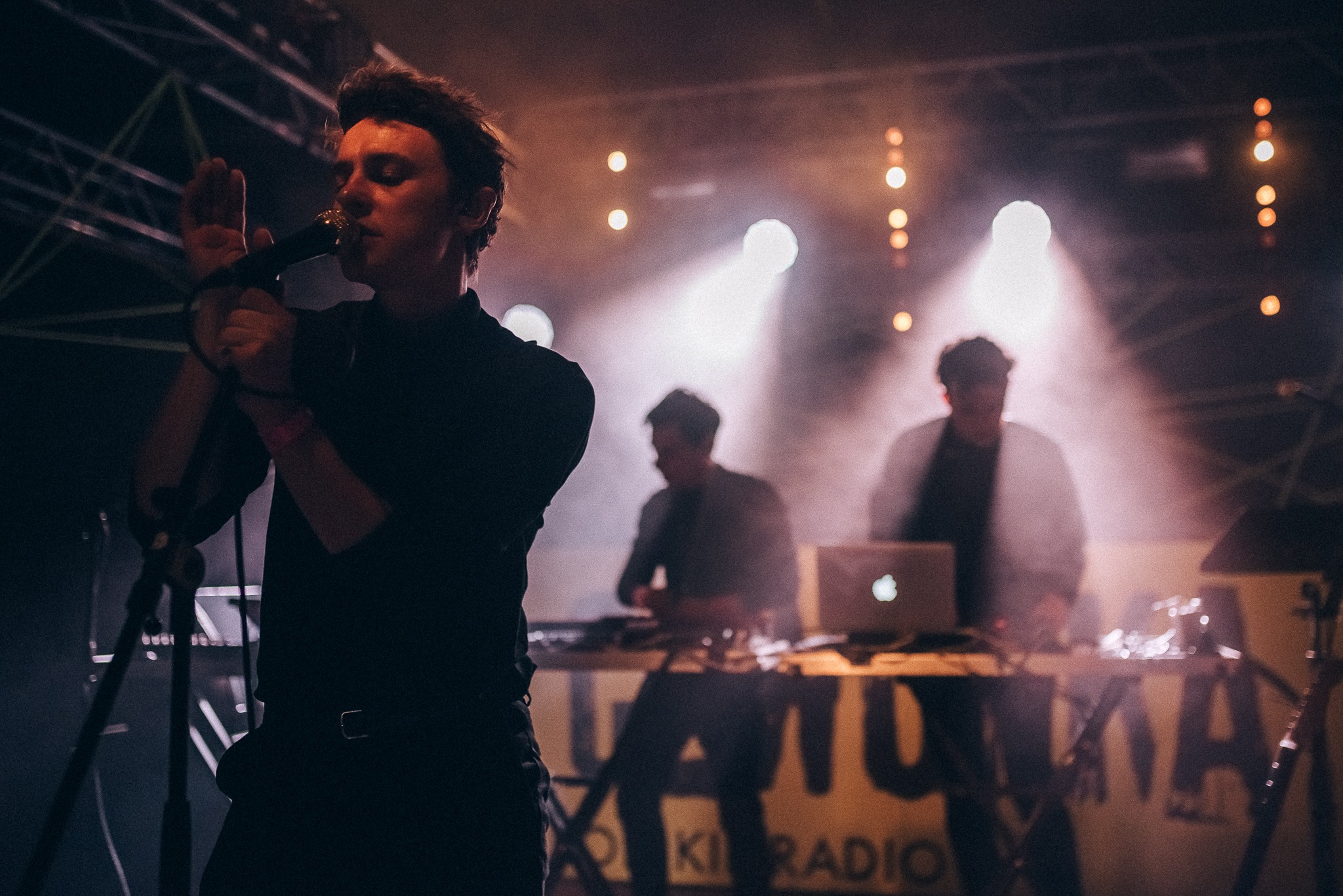 Kamp! na festiwalu Up To Date Festival na Czwartej Sceny Czwórki.